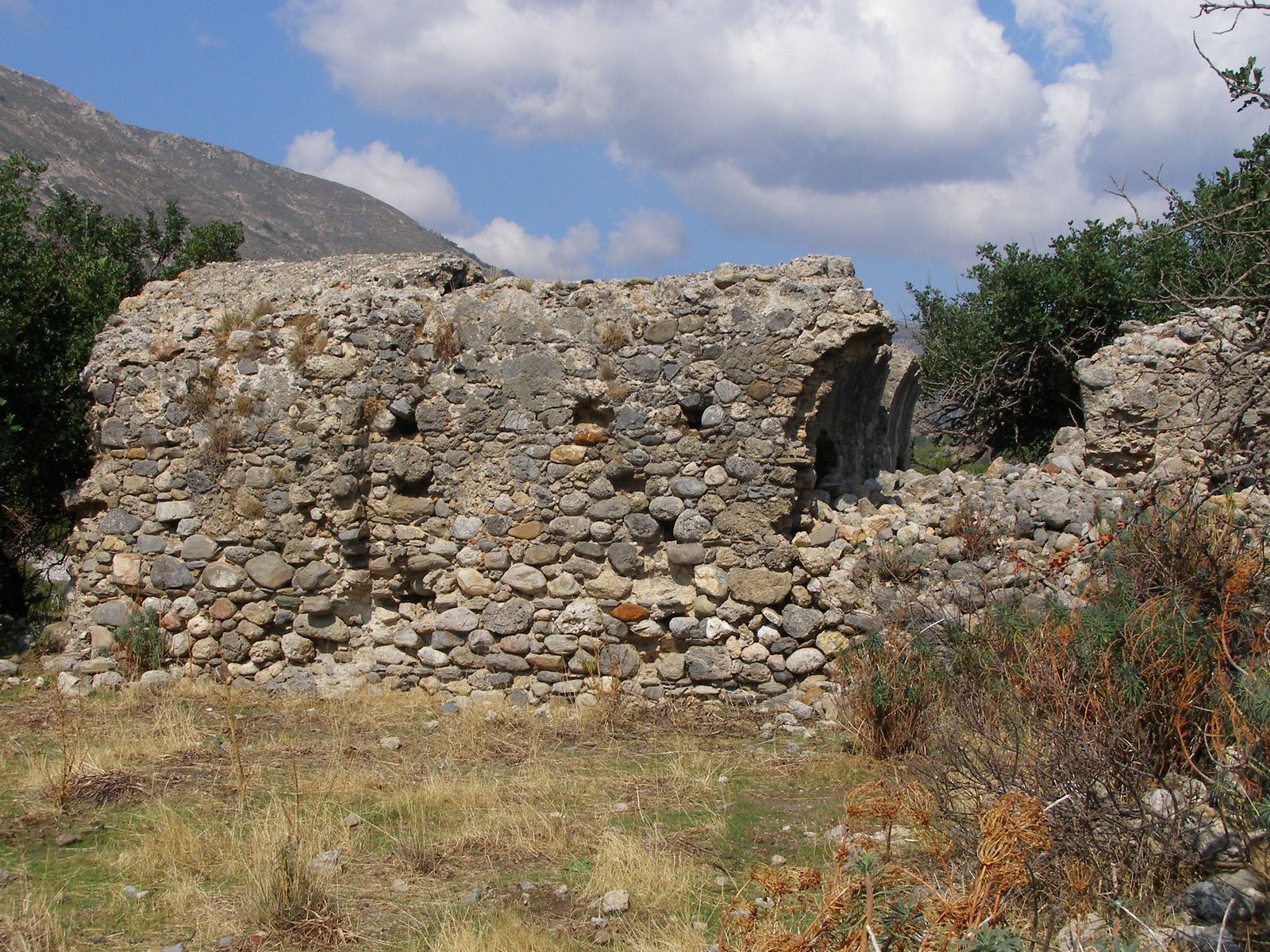 Ruinen einer frühbyzantinischen Basilika in Sougia / Kreta